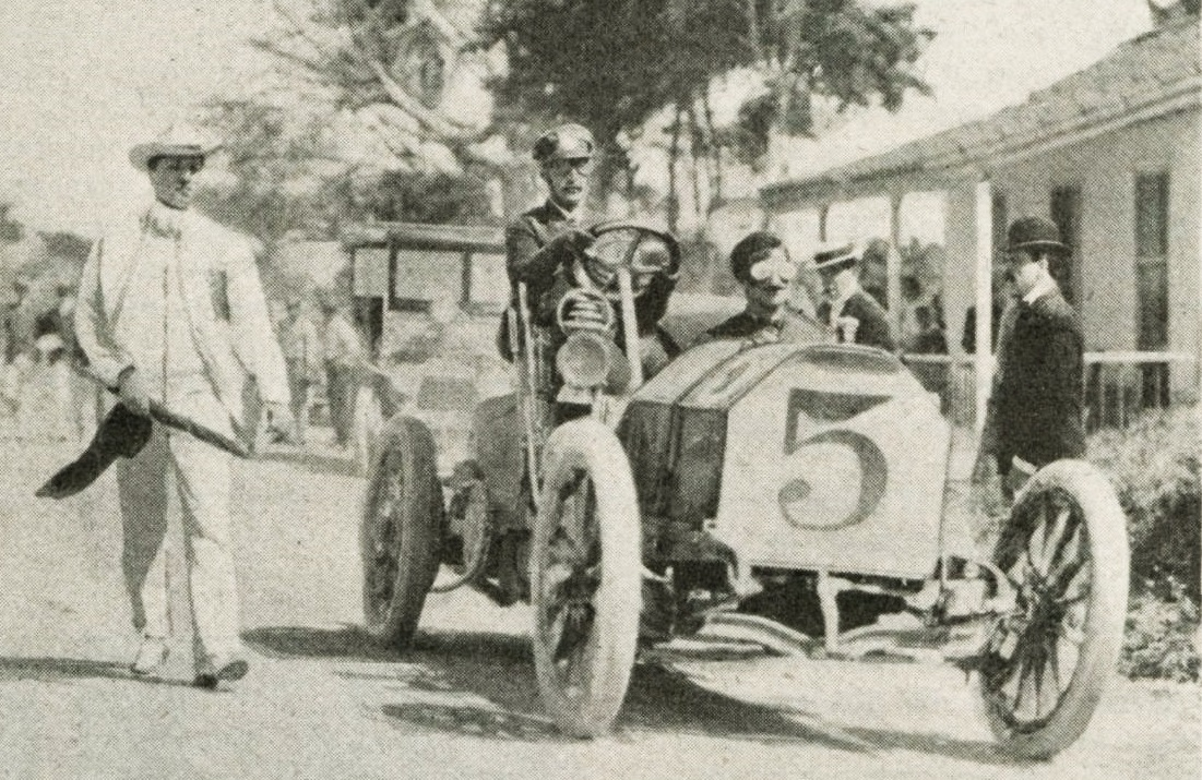 Ernesto Carricaburu, vainqueur des 100 miles de Cuba 1905 sur Mercedes 90 hp - La Vie au Grand Air du 9 mars 1905, p.193